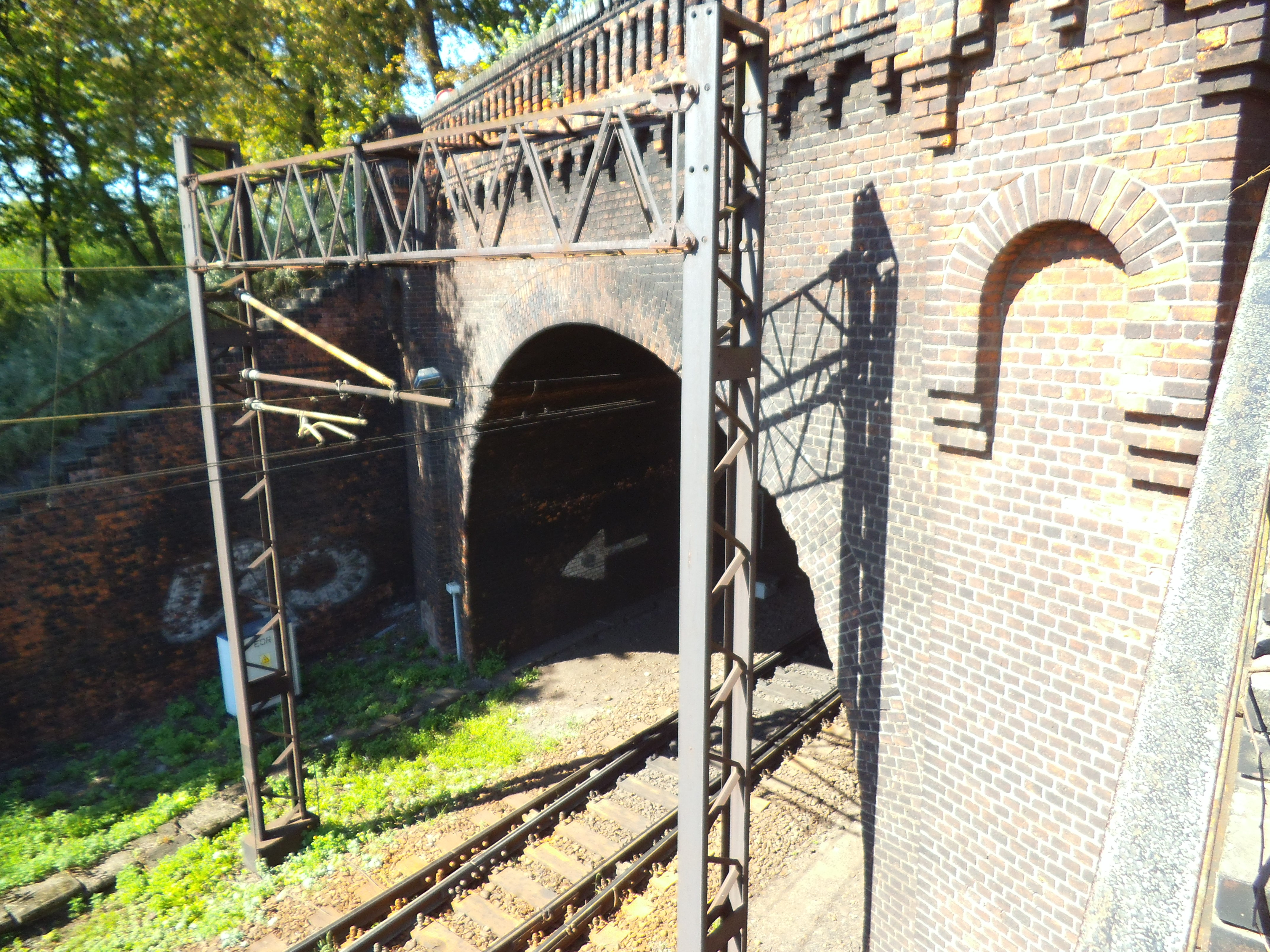 Tunel kolejowy w Toruniu